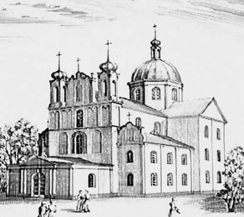 Беларуская (тарашкевіца): Магілёў (Mahiloŭ), вуліца Шклоўская (vulica Škłoŭskaja). Манастыр Богаяўленскі (Bohajaŭlenski)